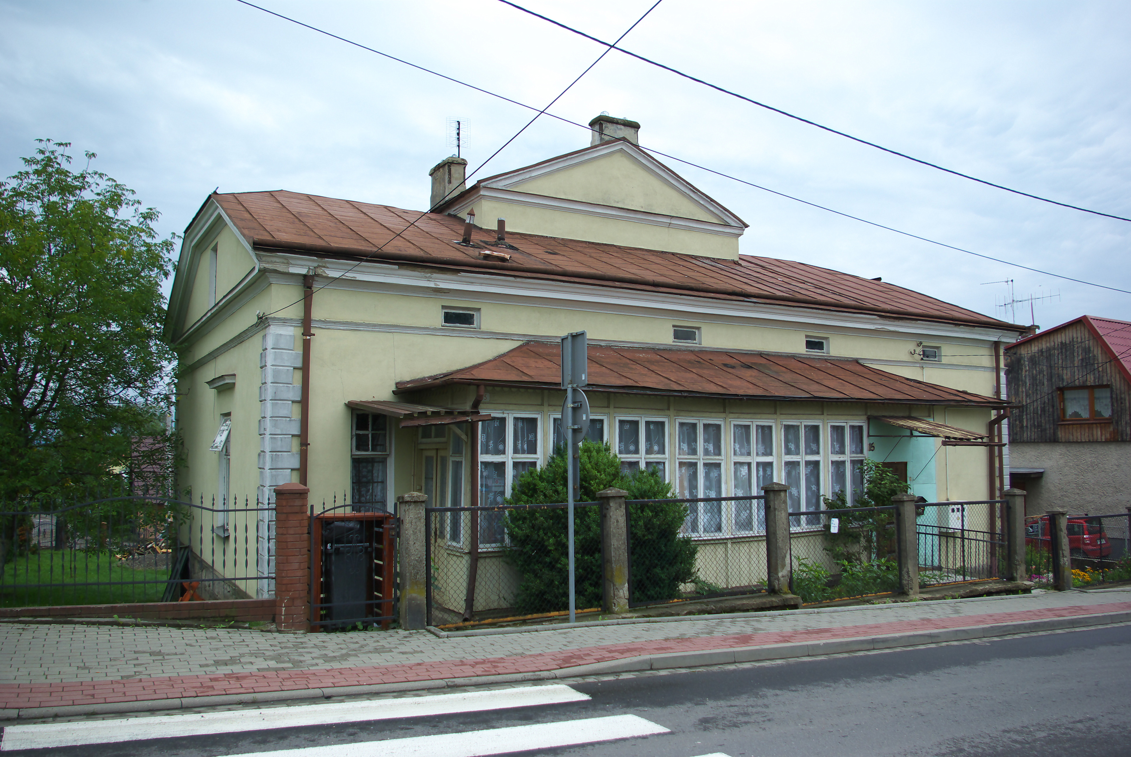 Rodzinny dom Władysława Brzozowskiego przy ulicy Sienkiewicza 15 w Sanoku